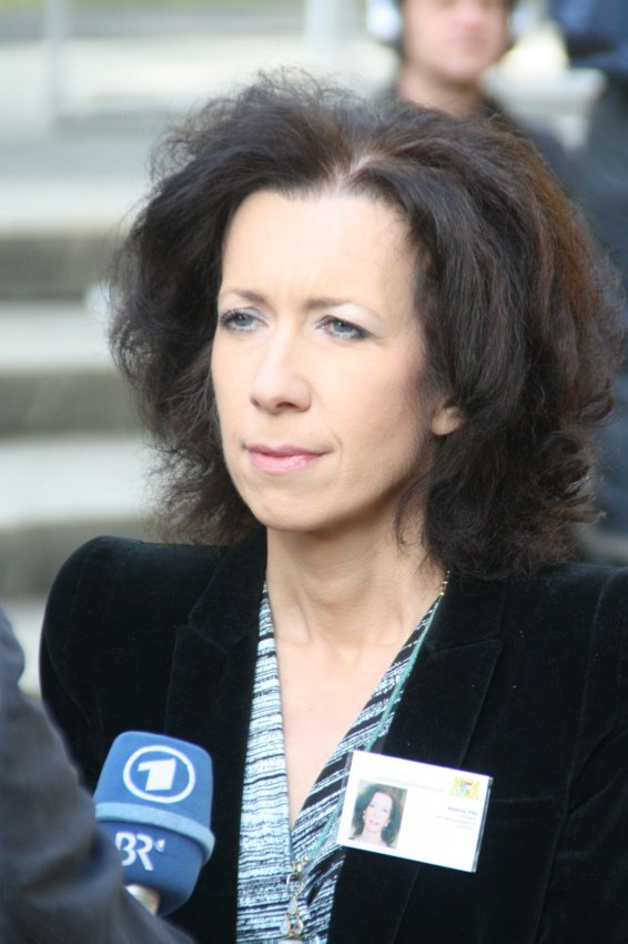 Andrea Titz, deutsche Richterin am Bausenat des Oberlandesgerichts München und am OLG München ebenfalls Leiterin der Pressestelle. Hier am 14.05.2013 vor dem Strafjustizzentrum München. Titel des Werks: "Andrea Titz, deutsche Richterin, am 14. Mai 2013 in München"